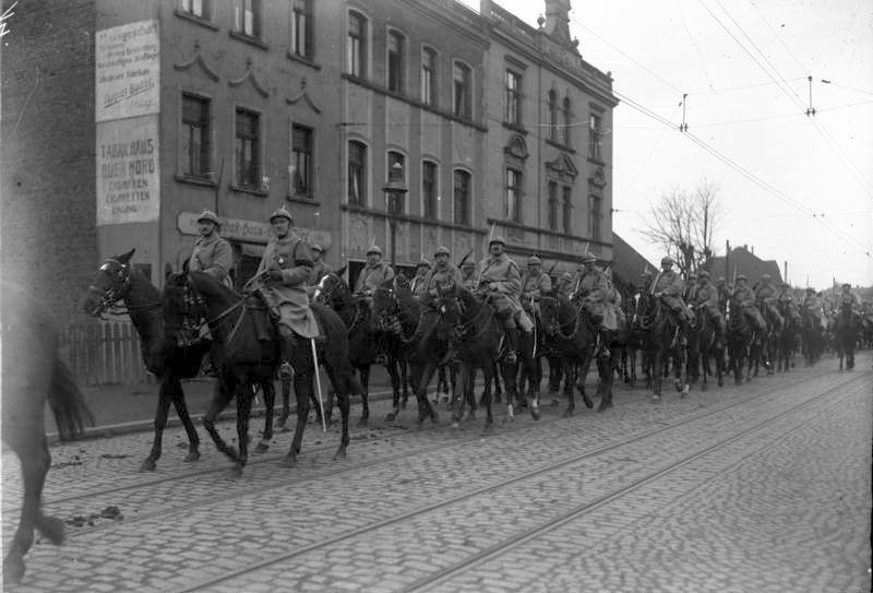 Zu den Ereignissen in Buer (Ruhrgebiet.) Französische Kavallerie in der Hauptstrasse von Buer. Information added by Wikimedia users.Bild aufgenommen in der Dorstener Straße 16-20, Buer in Westfalen.